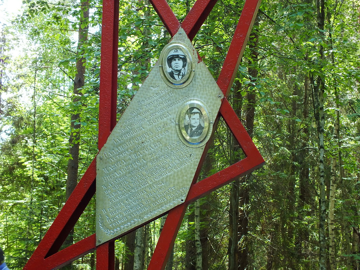 Текст на памятнике: 3 февраля 1993 г. здесь трагически оборвались жизни: заслуженного лётчика-испытателя Ларионова Бориса Владимировича (19.11.41) и лётчика-испытателя Мазура Анатолия Витальевича (22.V.59) К далёким звёздам высота звала, Но жизнь была оборвана в полёте... Здесь два пилота словно два крыла, Слились с землёй в горящем самолёте. И голову склонил народ, А небо-голубое знамя. Пусть никогда не зарастёт Травой забвенья наша память...